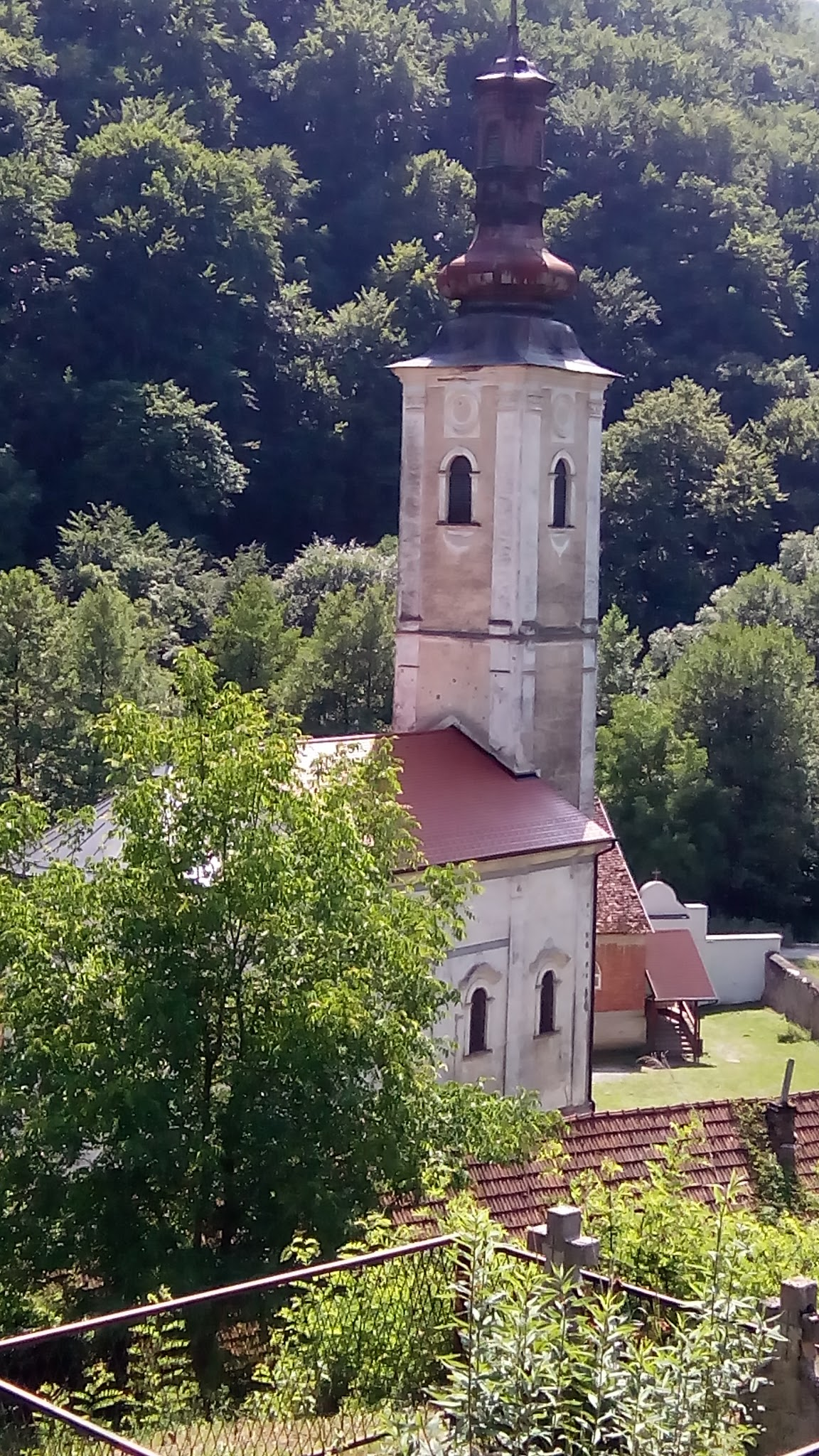 43500, Donji Borki, Croatia